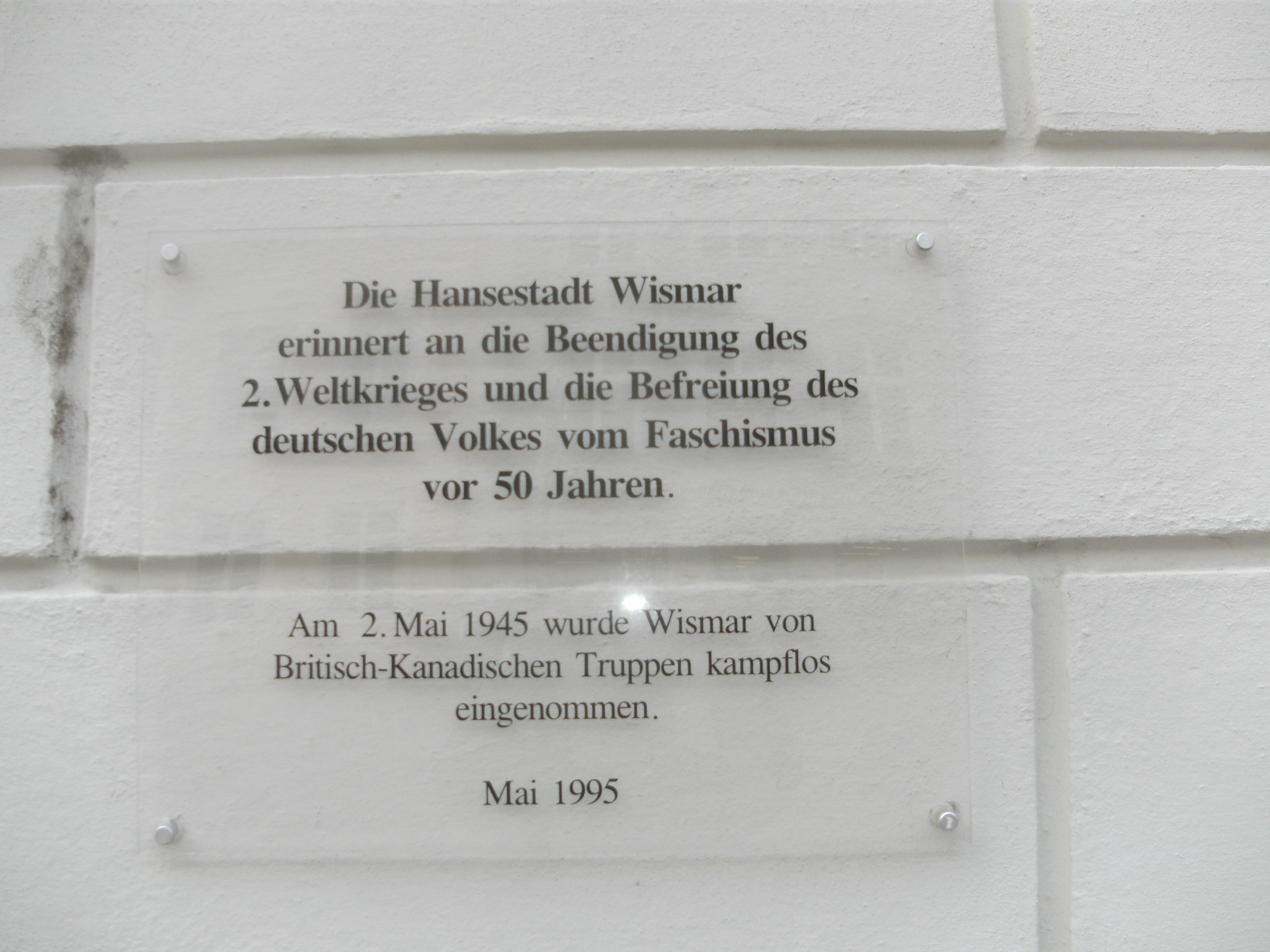 Wismar, Gedenktafel (vom Mai 1995) an einer seitlichen Außenwand des Rathauses, mit der sich die Stadtväter seinerzeit bei den Angloamerikanern für die "Befreiung des deutschen Volkes vom Faschismus vor 50 Jahren" bedankten.